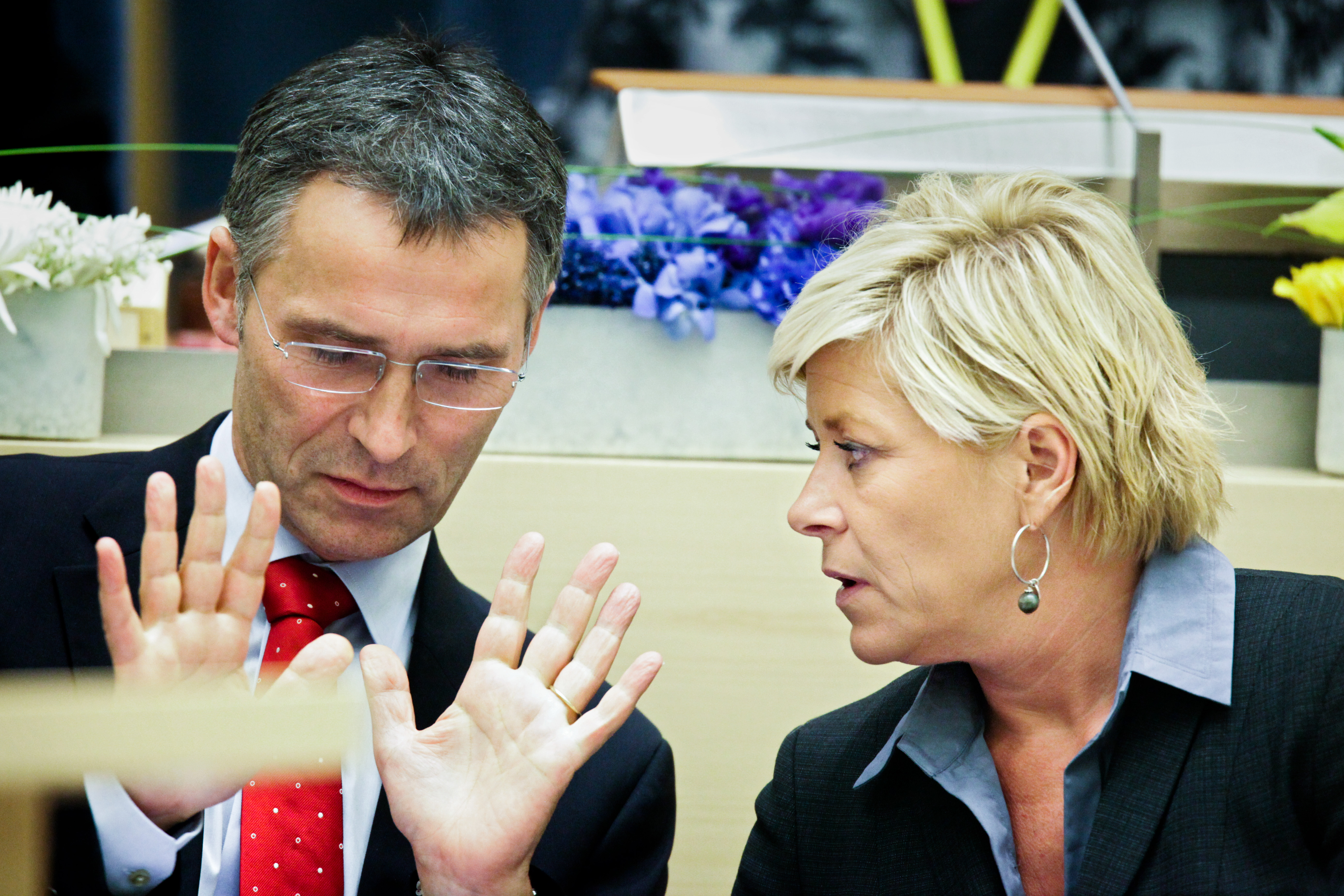 Jens Stoltenberg och Siv Jensen. Nordiska rådets session i Stockholm 2009.